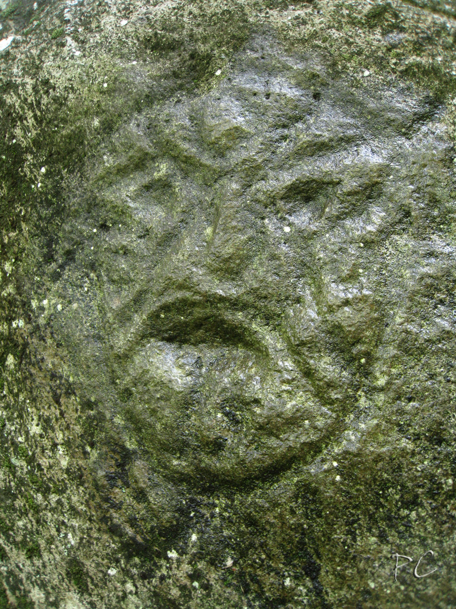 Pétroglyphe Arawak, rivière Plessis (Guadeloupe)